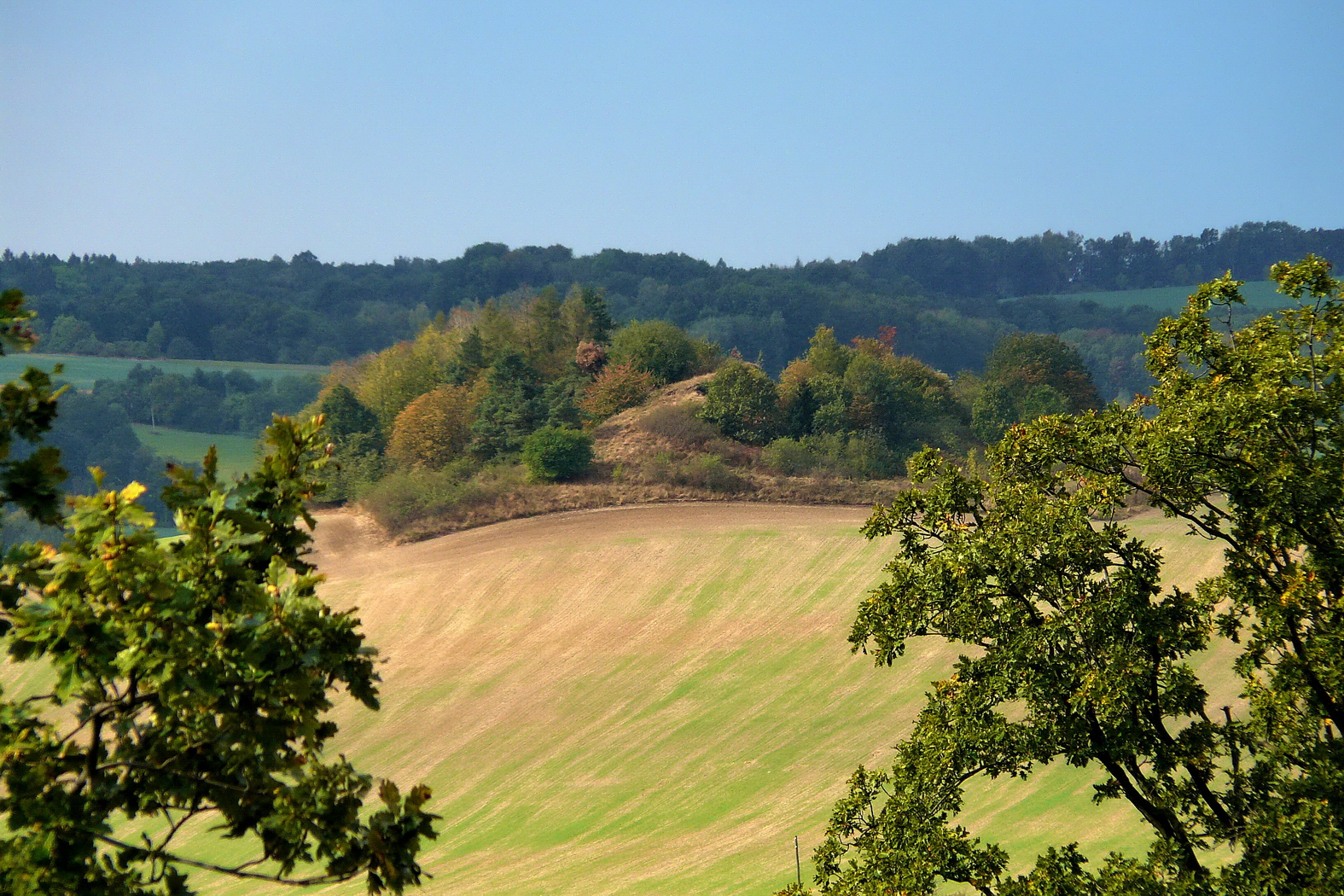 Vrch Dubolka z vrchu Houser